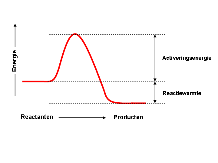 Activeringsenergie - eigen werk - PD